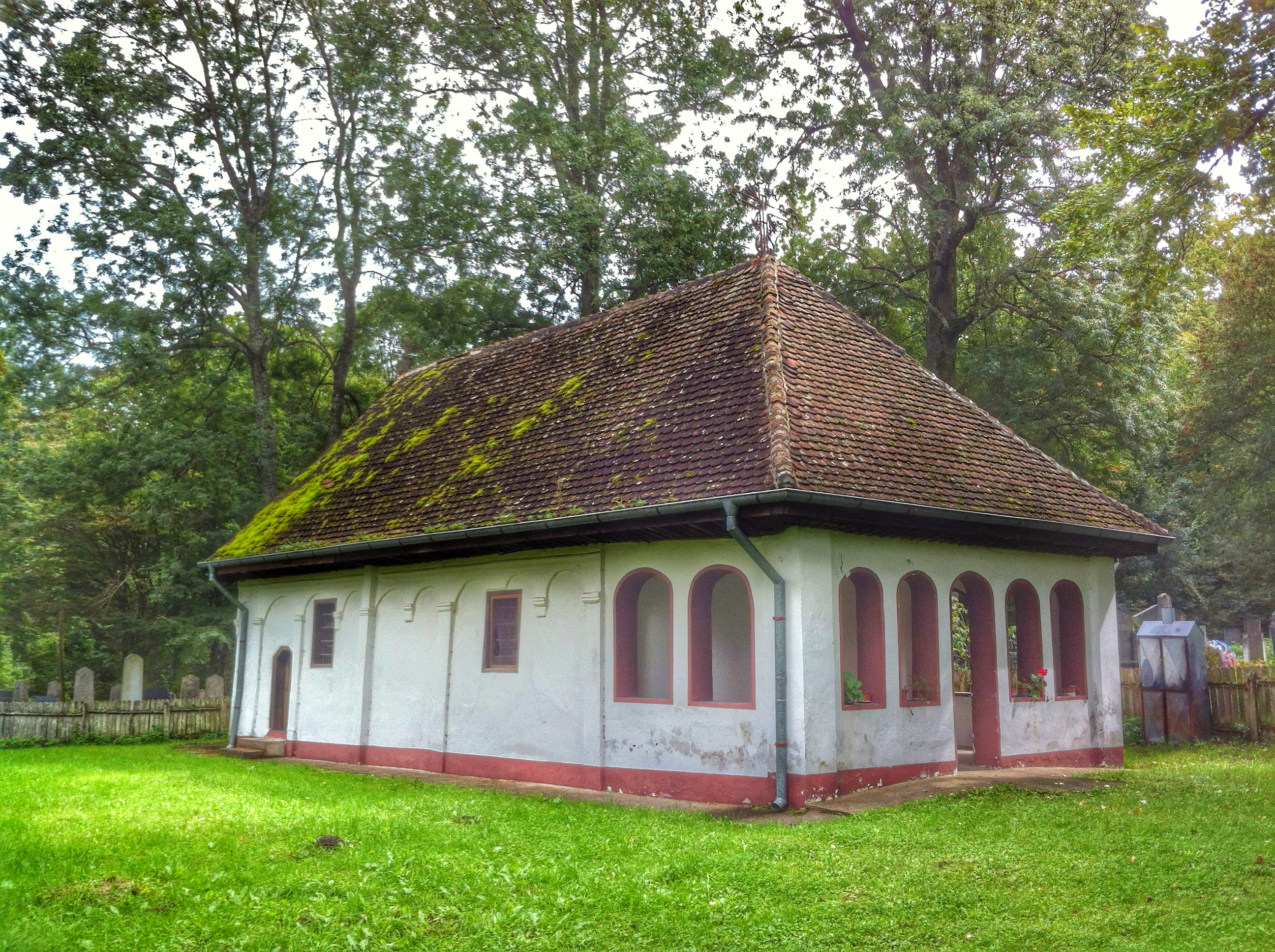 Саграђена је средином 18.века. У овој брвнари је 1779.године почела са радом и школа.